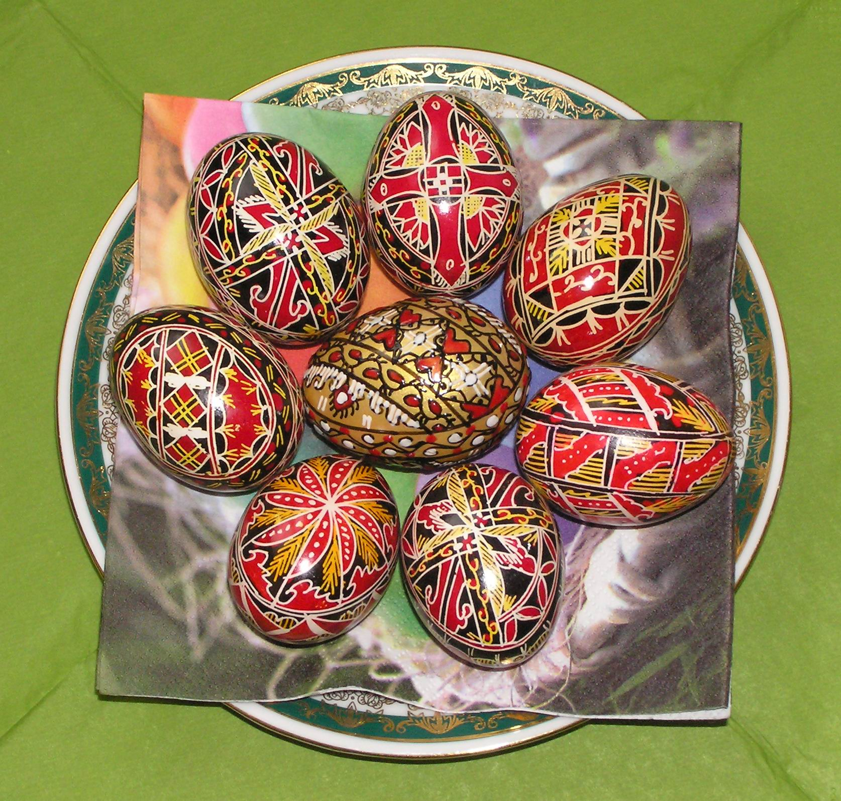 Eier mit Wachs und Farben in traditionellem ukrainischen Stil dekoriert.